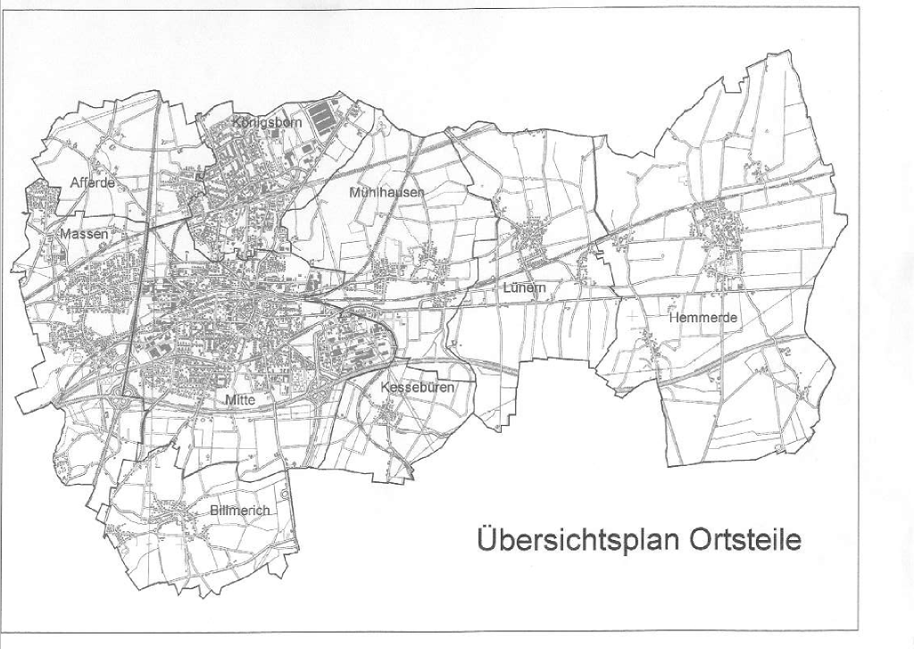 Übersichtsplan Ortsteile der Stadt Unna